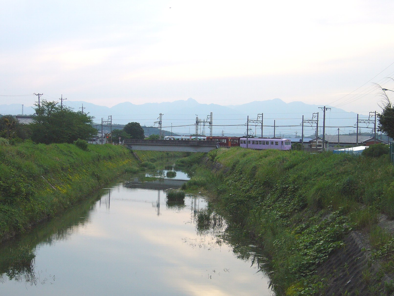 鹿化川（かばけがわ） 鹿化橋（旧東海道）から西望 近鉄内部線が渡る（赤堀～日永） 彼方は鈴鹿山脈